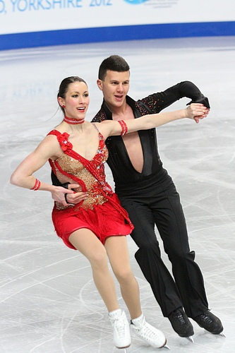 Шарлин Гинар и Марко Фаббри (Италия) на чемпионате Европы по фигурному катанию 2012